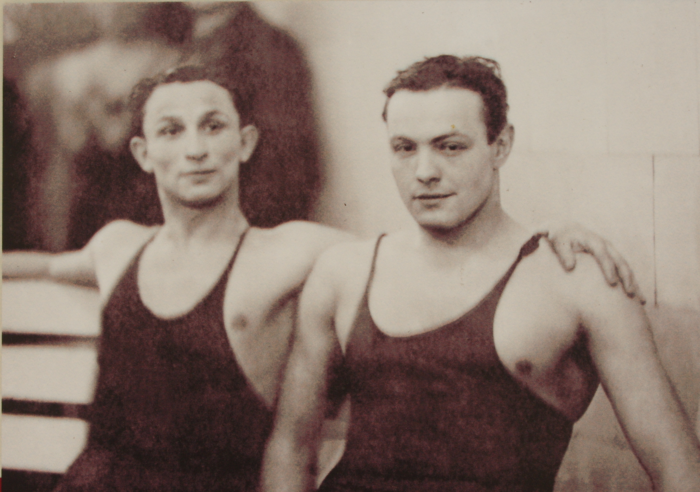 Fragment wystawy plenerowej ”Sport Żydowski w przedwojennej Warszawie” autorstwa dr Jarosława Rokickiego, przygotowanej przez Fundacje im. prof. Mojżesza Schorra, a prezentowanej na przełomie 2012/2013 r., przy ul. Twardej 6 w Warszawie. Na fotografii fragment tablicy pt. "Olimpijczyk, pływak i bohater - Ilija Szrajbman (ur. 1905 Warszawa - zm. styczeń 1943 Warszawa). Fragment z reprodukcją zdjęcia Ilji Szrajbmana z Kazimierzem Bocheńskim